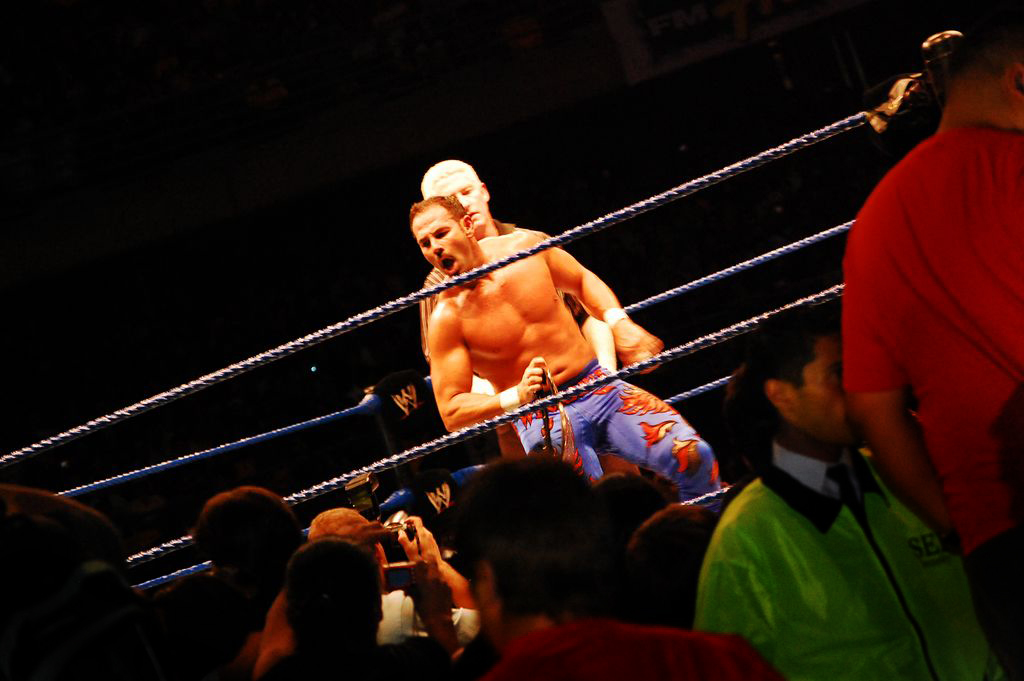 chavo guerrero en chile